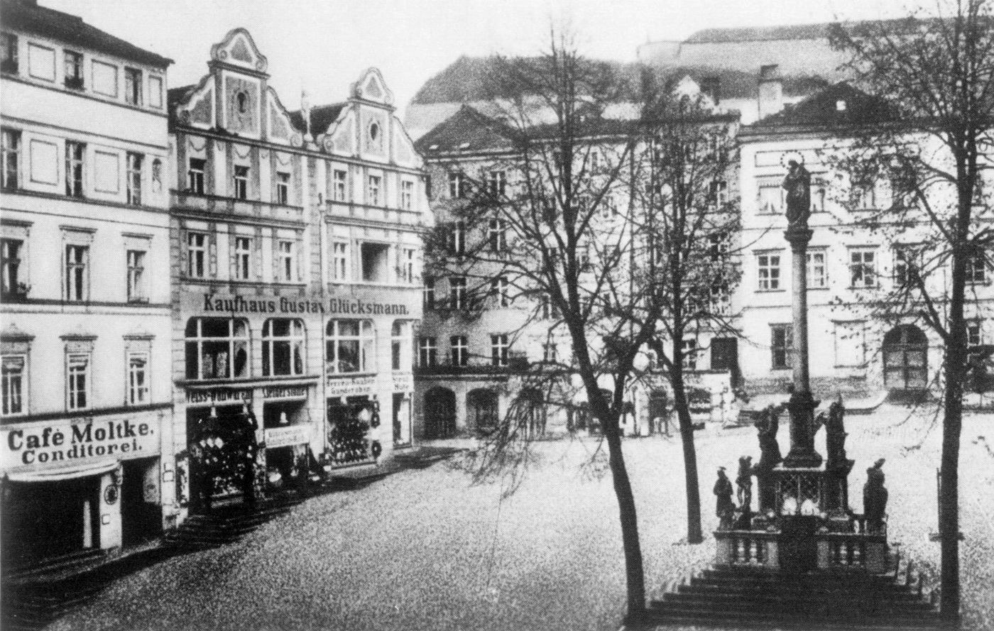 Oberring in Glatz (Kłodzko) in 20 Jh